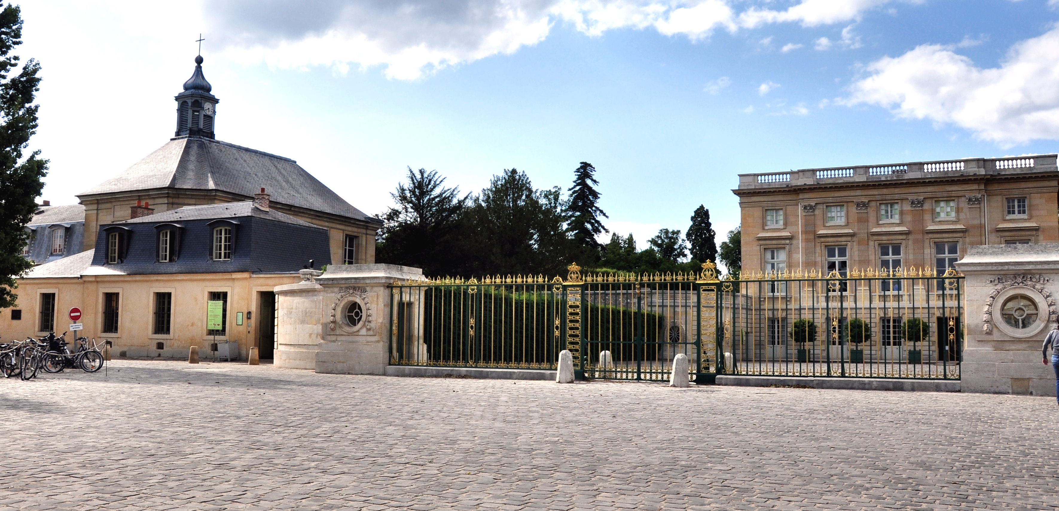 Le Petit Trianon, à Versailles - façade sud et cour d'entrée, sur l'allée du Petit Trianon